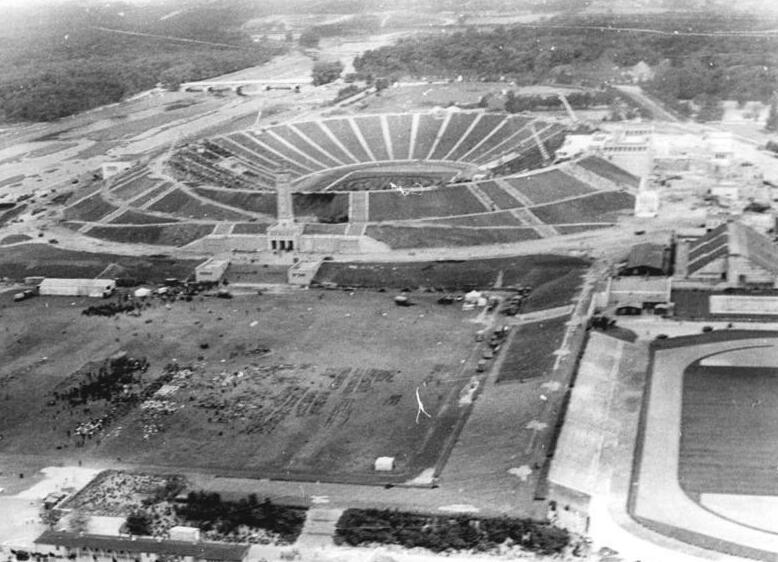 Zentralbild Bey-Krz. 1.8.1956 Luftaufnahme eines Teiles des Sportforums der Deutschen Hochschule für Koerperkultur und Sport in Leipzig. Im Vordergrund erkennt man die Festwiese und das neuerbaute Zentralstadion. Rechts vorn der Teil eines Trainingsplatzes. Links hinter dem Zentralstadion entsteht die neue Regattastrecke.